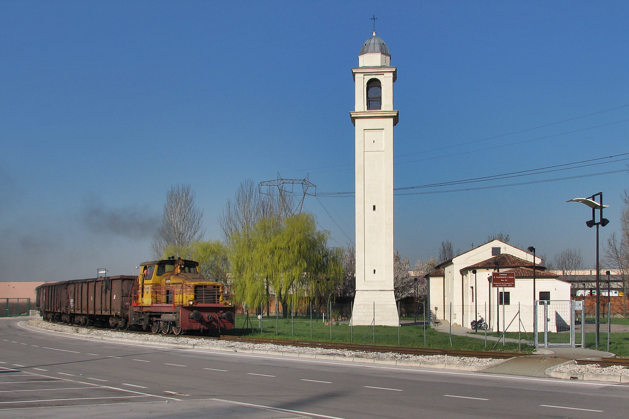 La locomotiva CoRacFer 21 è impegnata con una tradotta tra Padova Interporto e le Acciaierie Venete.